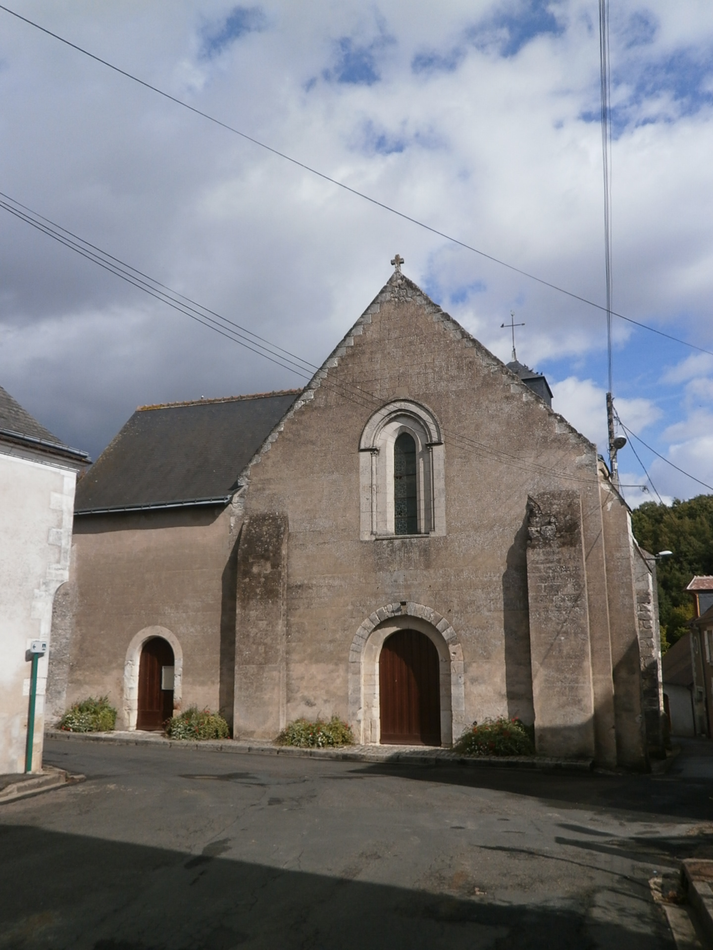 Église Sainte-Luce de Luzillé